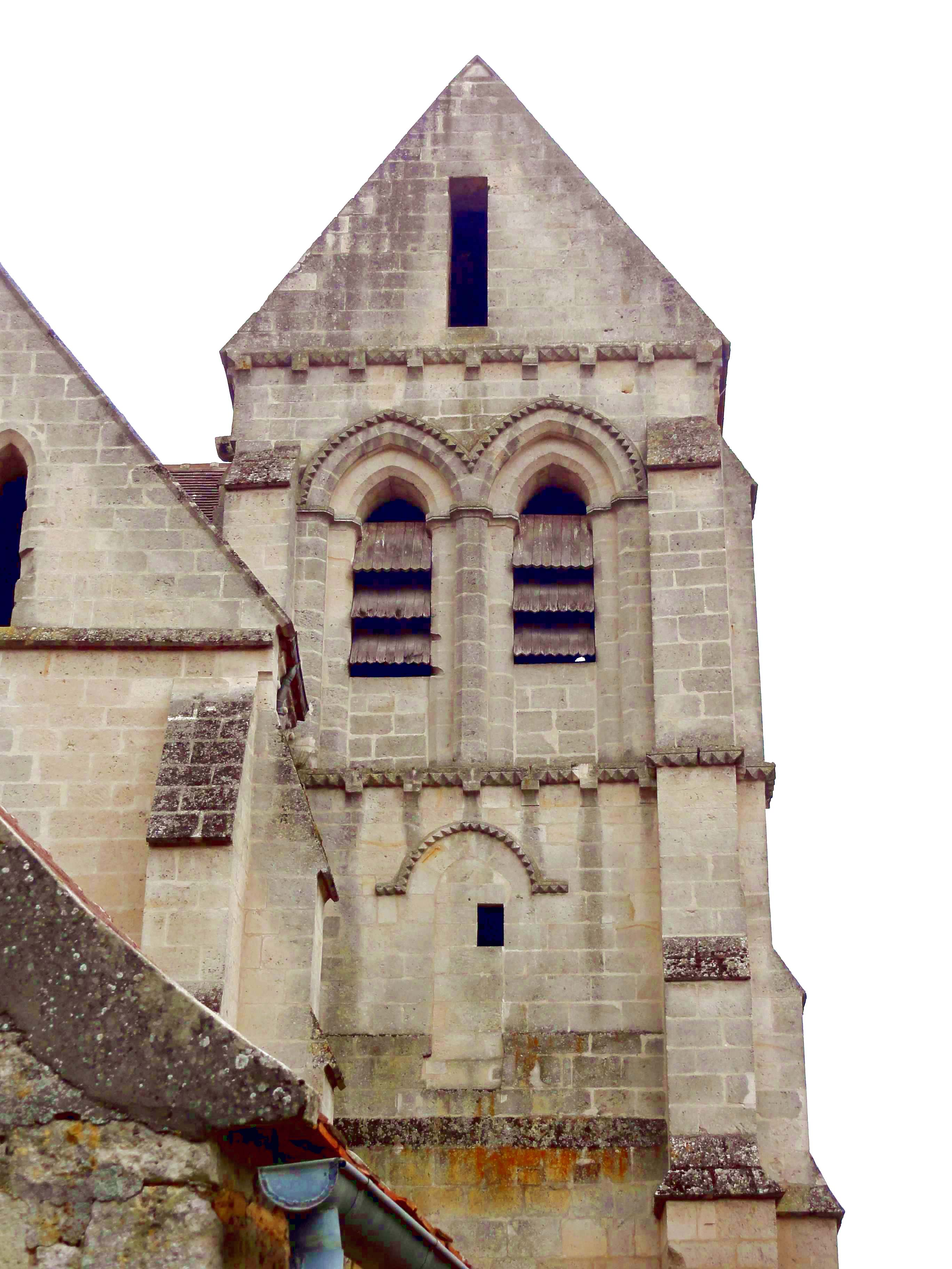 Église Saint-Martin-et-Saint-Léonard de Vez - voir titre.